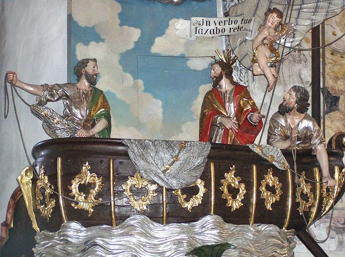 Fischerkanzel (Ausschnitt)